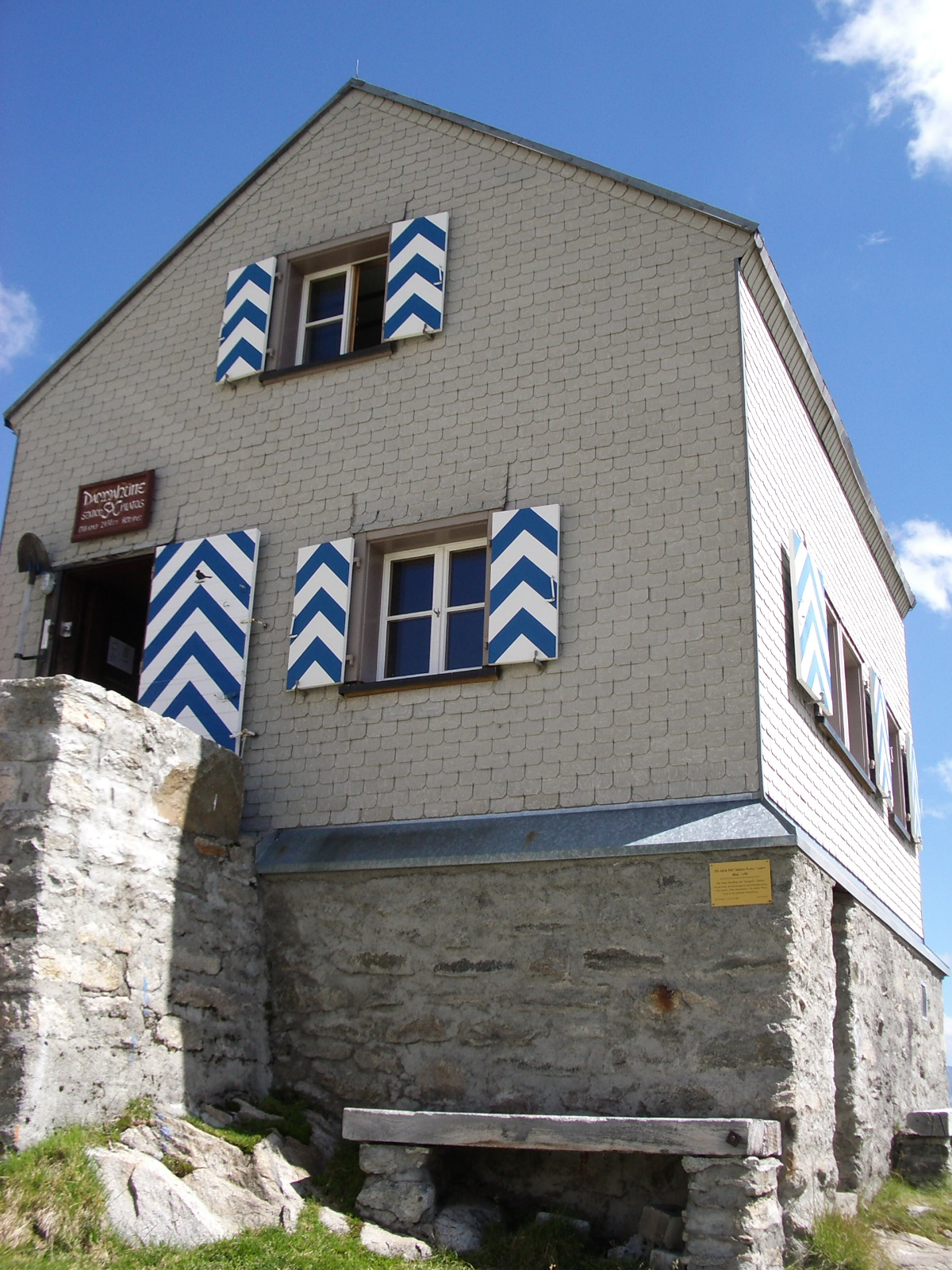 Dammahütte UR, Switzerland